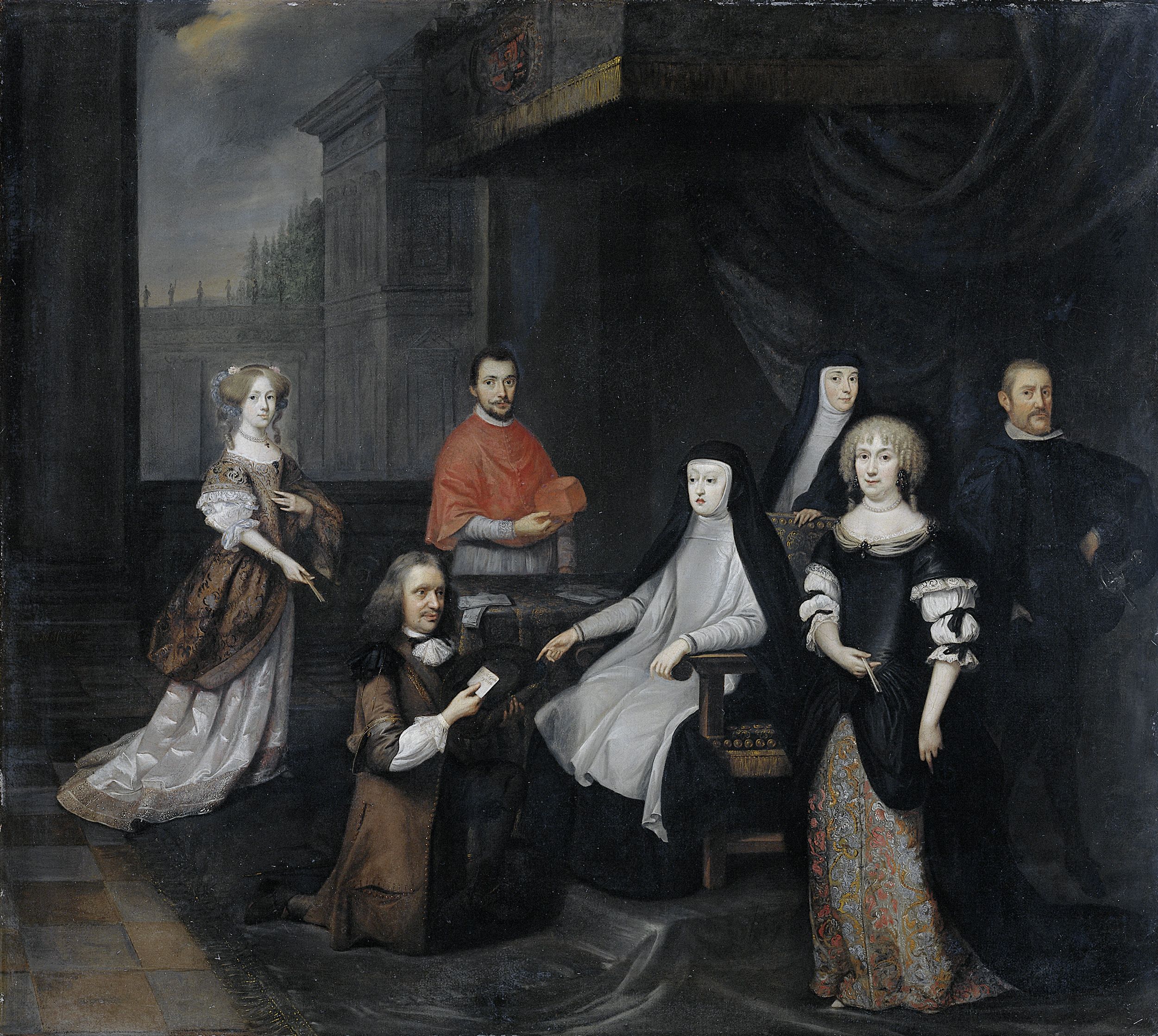 Hieronymus van Beverningk (1614-90), Nederlands buitengewoon ambassadeur, wordt in geheime audiëntie ontvangen door de Spaanse koningin-regentes Maria-Anna van Oostenrijk, 2 maart 1671. De ambassadeur knielt aan de voeten van de als abdis geklede koningin-regentes en overhandigt haar een brief. Achter de tafel staat kardinaal Luis Fernandes de Portocarrero (1635-1709), een raadsman van de regentes. Op de voorgrond rechts Joanne Le Gillon (1635-1706), echtgenote van Van Beverningk. Links een staande jonge vrouw met een waaier. Op de achtergrond door een venster gezicht op een paleis.